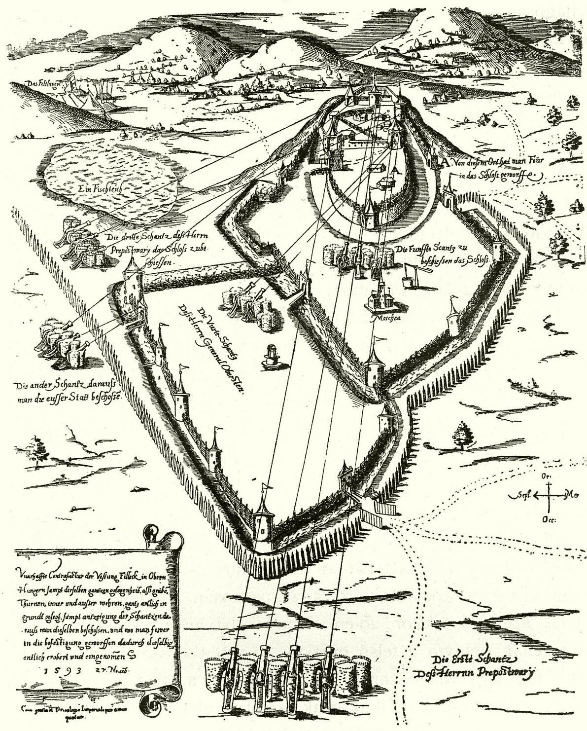 Fülek látkép a Történelmi Képcsarnok egykorú metszetéről reprodukálva. Aláírása: Vuarhaffte Contrafactur der Veftung Filleck in Obern Hungern sampt derselben gamtzen gelegenheit, alss gräbe(n) Thurnen, inner vnd ausser wehren, gantz artlich in grundt gelegt, sampt antzeigung der Schantzen darauss man dieselben beschossen, vnd wo man fewer in die befestigung geworffen dadurch dieselbig entlich erobert vnd eingenom(m)en. 1593. 27. Noue(m)b(ris). Cum gratia et Privilegio Impcriali per annos quatuor